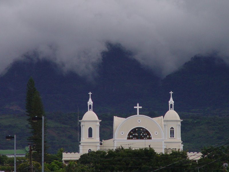 Parroquia Nuestra Señora del Rosario, Catedral Estelí, Nicaragua.